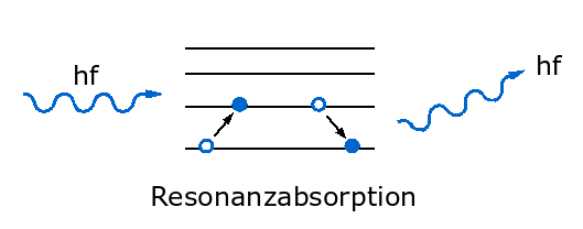 Resonanzabsorption